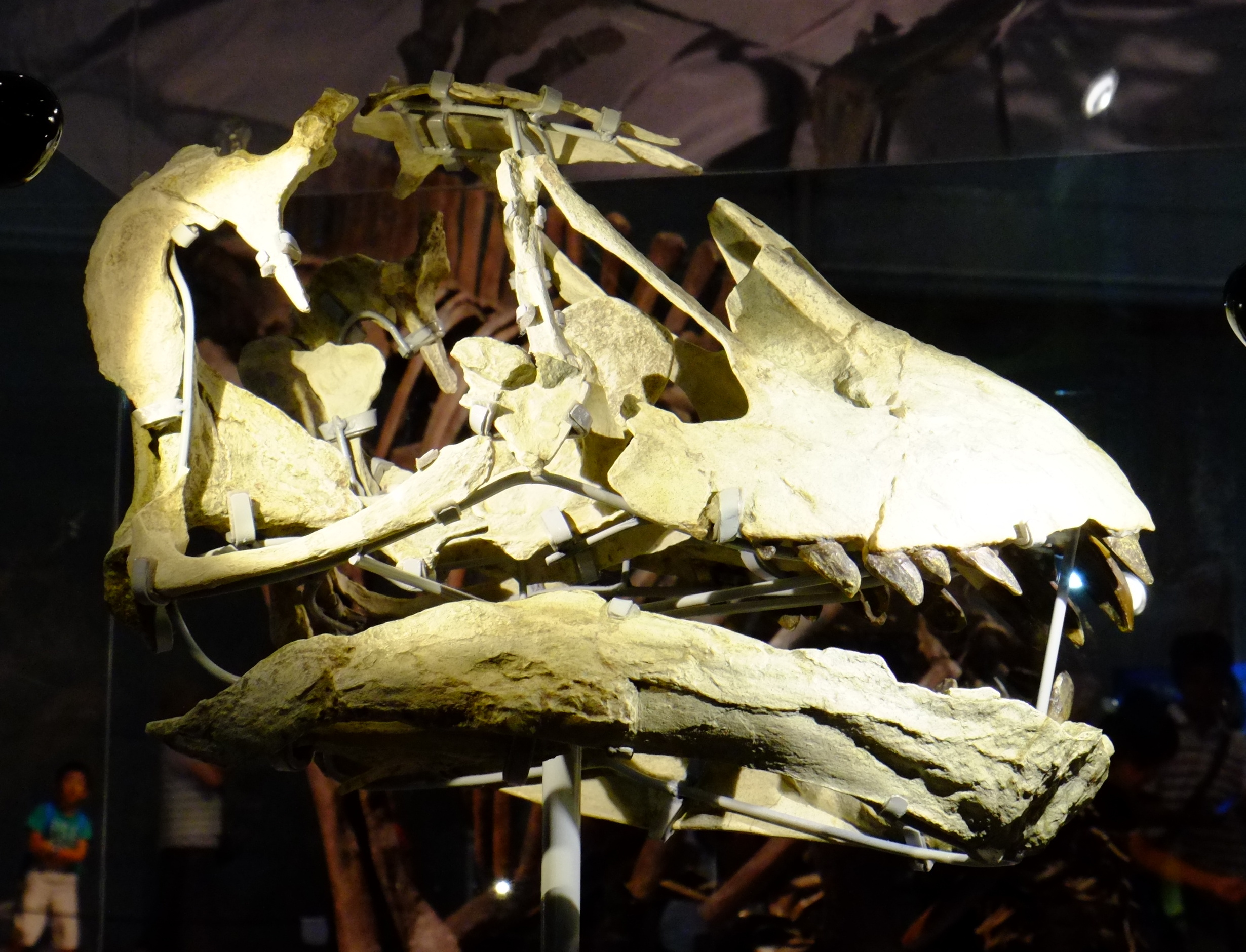 死後首から遊離しやすい竜脚類の頭骨の中でもエウヘロプスでは頭骨の保存状態が良いらしい。 これは2013年の研究結果を元に復元されたもの。